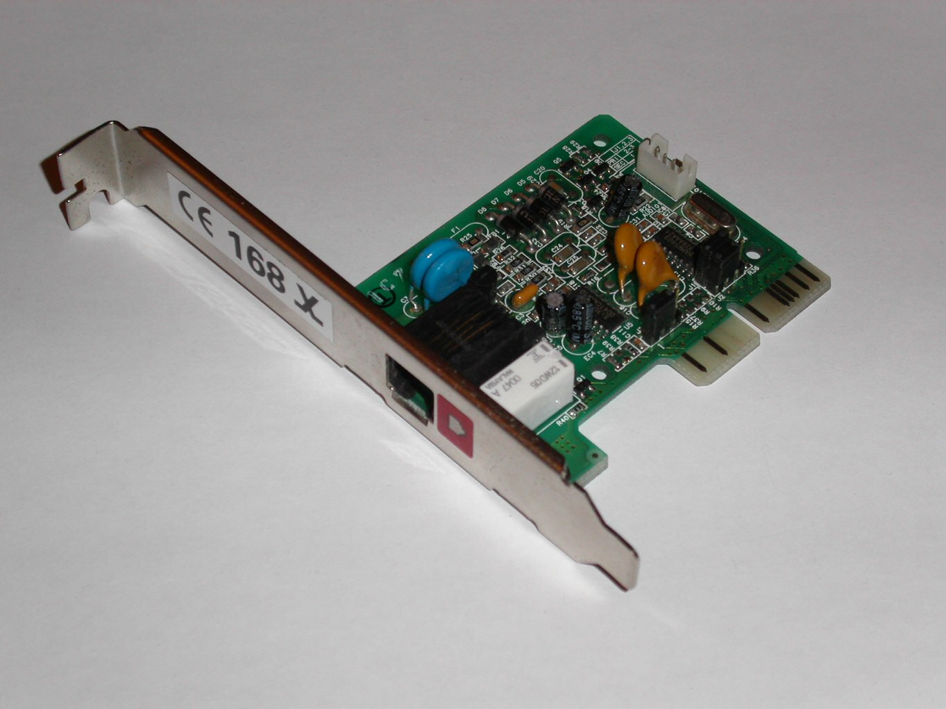 Beschreibung: AMR Modem aus einem Fujitsu Siemens T-Bird (Eisleben, 24. März 2005) *Quelle: selbst fotografiert *Fotograf oder Zeichner: Pascal Giessler